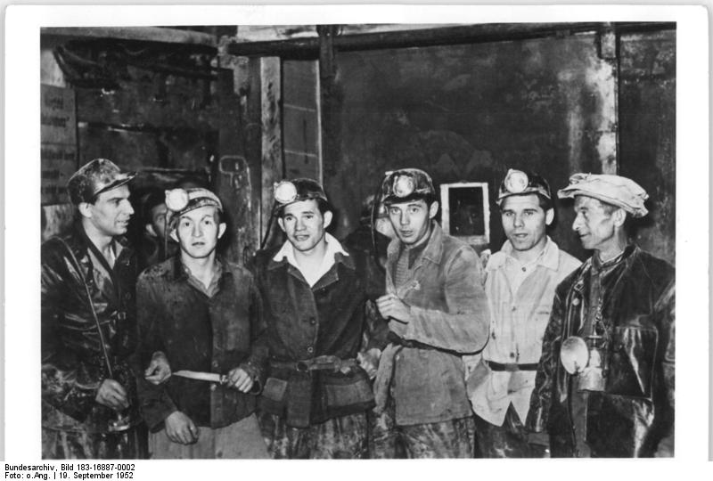 Bergarbeiter, Gruppenfoto im Schacht Vorgeschlagen zum Nationalpreis 1952 UBz: Die Brigade Hans Bleisch von der Wismut AG in Chemnitz, die den Fünfjahrplan in zwanzigeinhalb Monaten erfüllt hat.vlnr: Die Kumpels der Jugendbrigade Hans Bleisch, Stefan Glaser, Schießmeister Fischer, Hans Bleisch, Harry Renner, Eduard Acksteiner und Hans Krauß.Zentralbild 19.9.1952